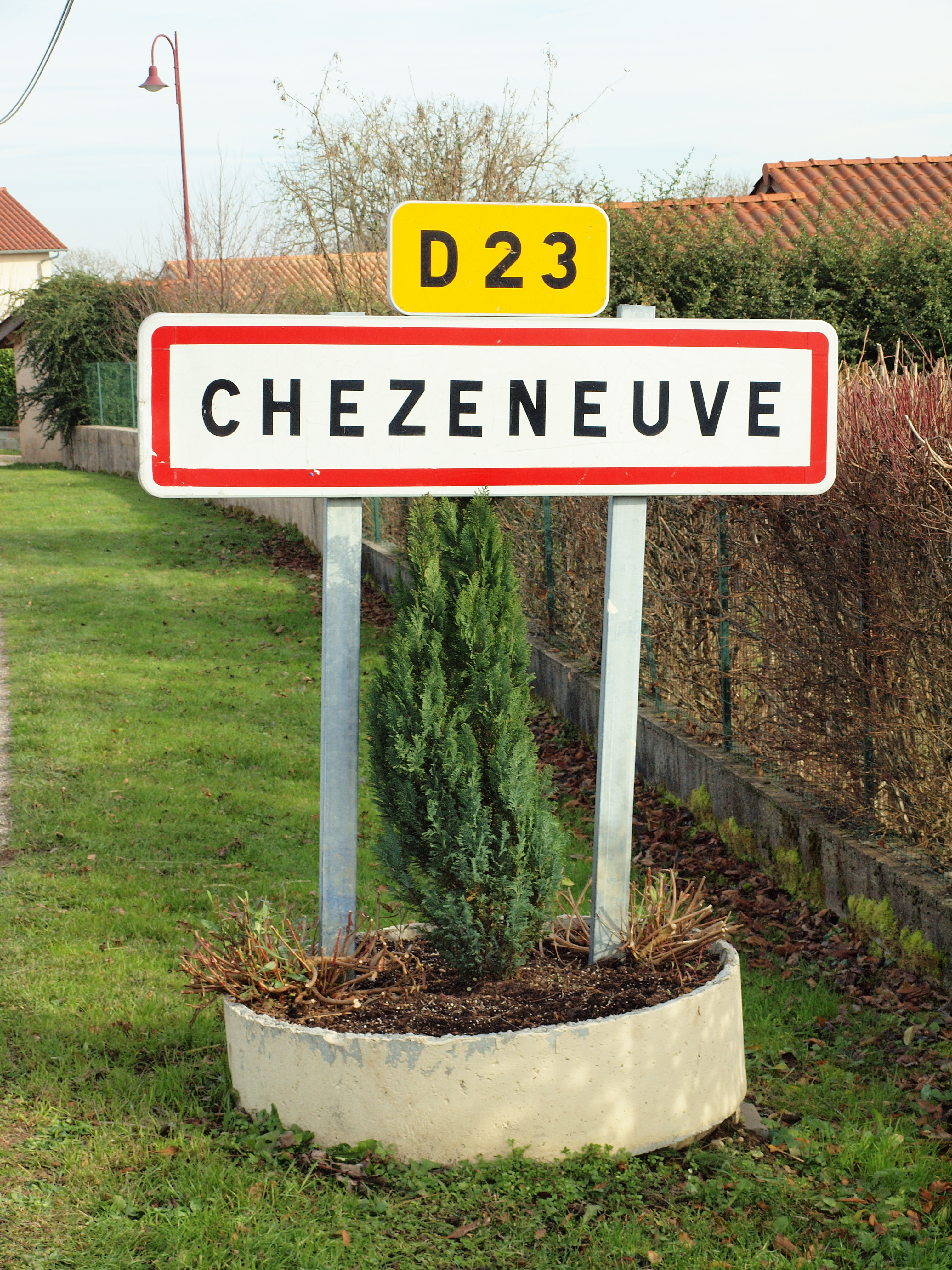 Chèzeneuve (Isère, France)